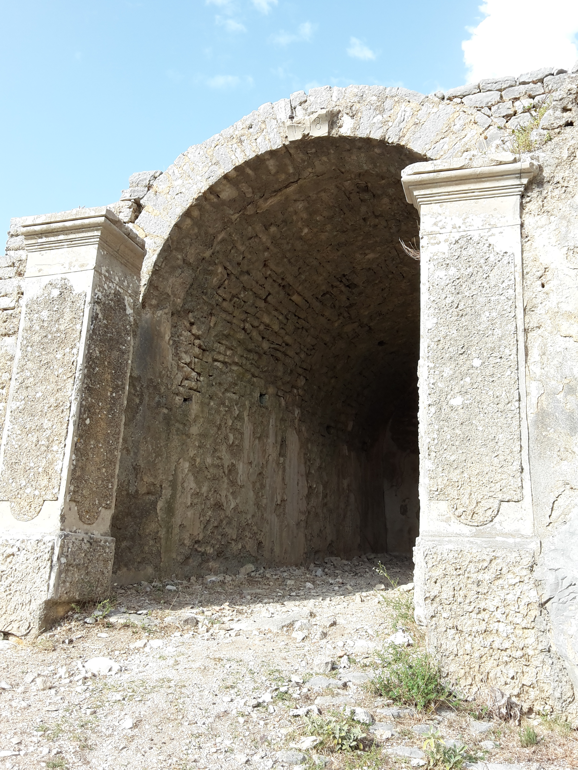 Kalaja E Borshit